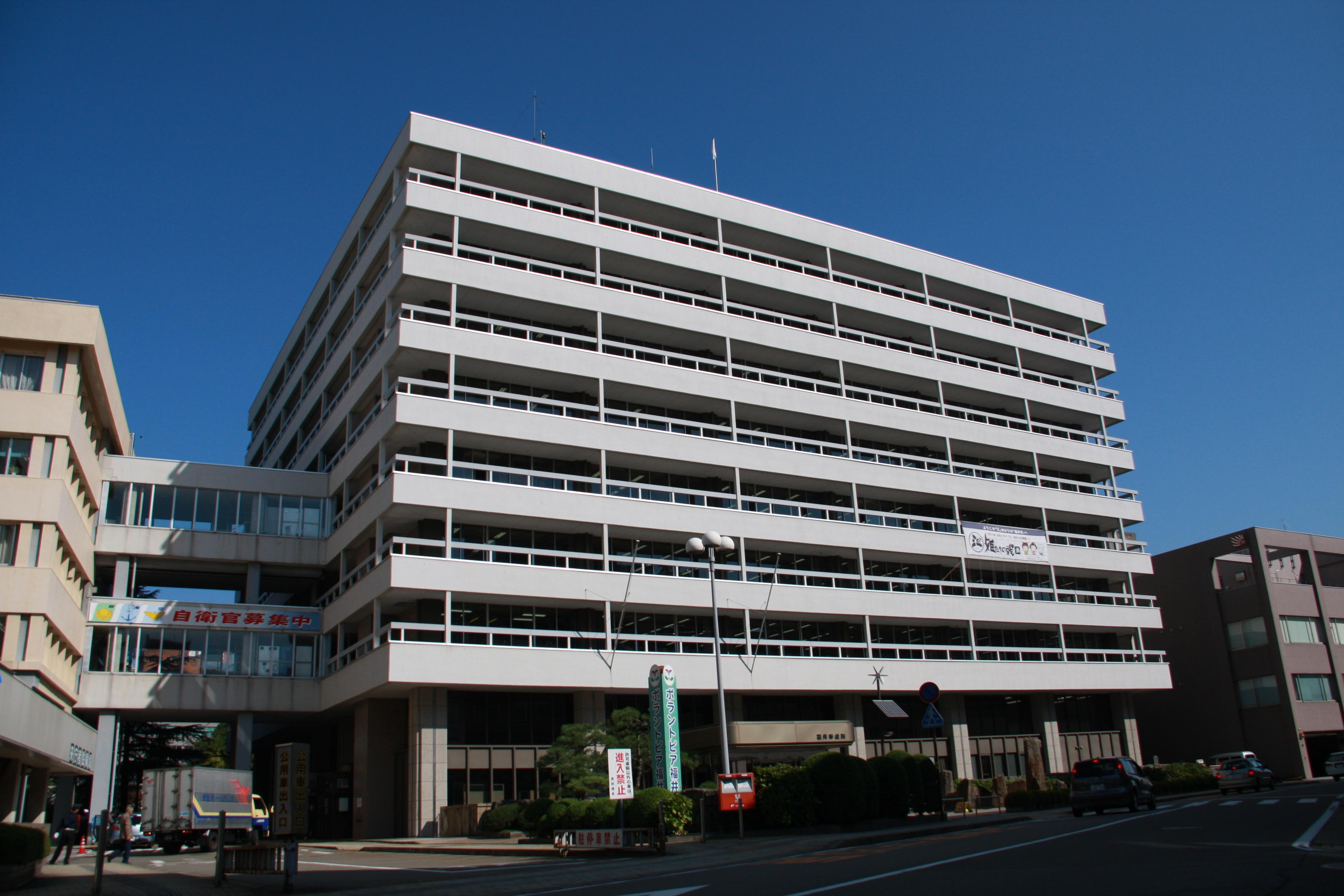 福井市庁舎